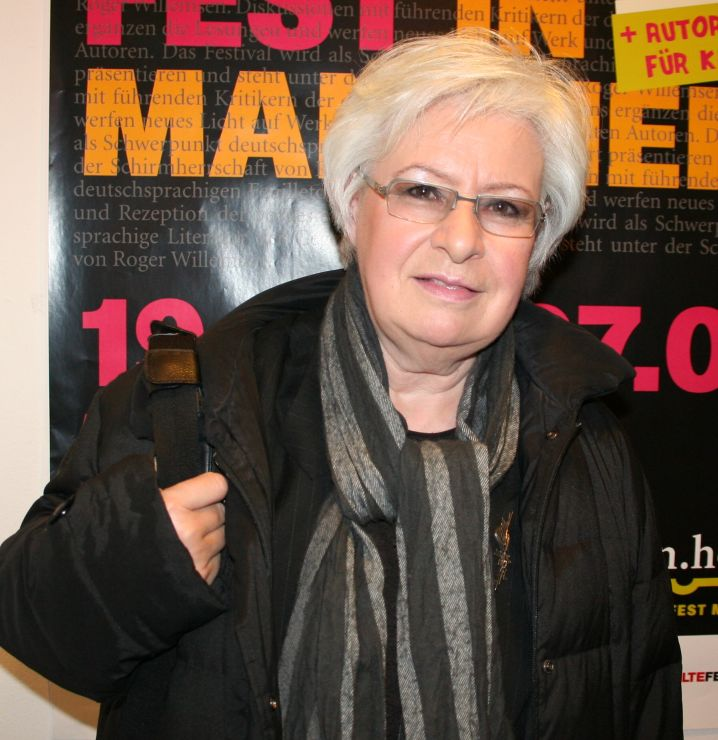 Sigrid Löffler beim Mannheimer Literaturfest "lesen.hören 3" in der Alten Feuerwache